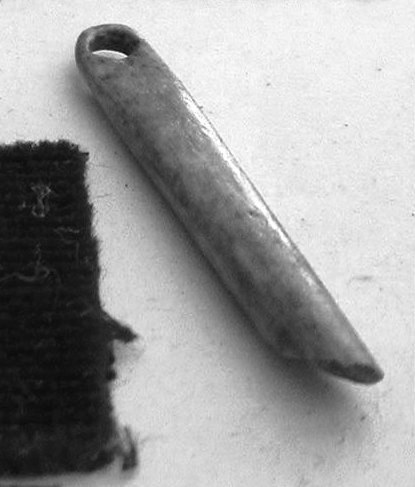 Fragment d'aiguille à chas en os retrouvé dans la grotte de Cottier à Retournac